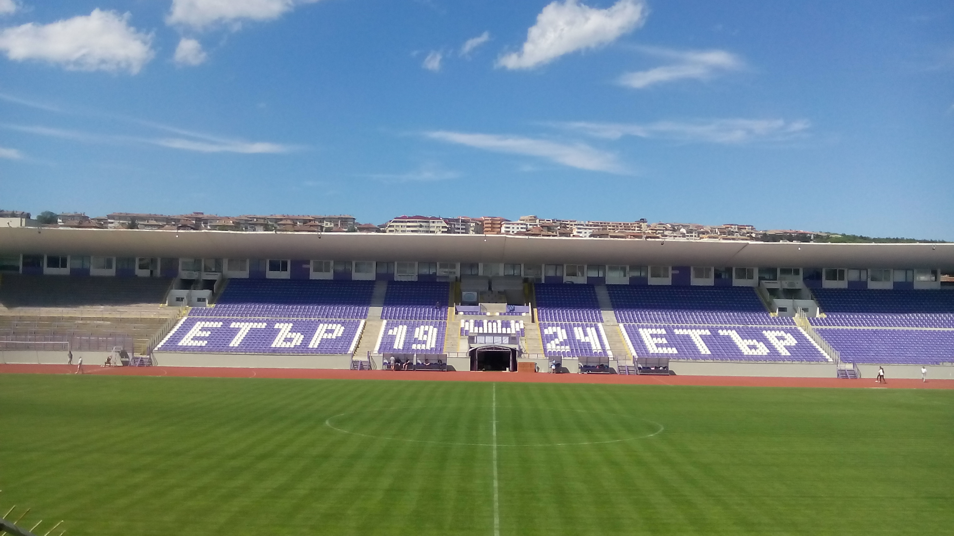 Аҧсшәа: Стадион Ивайло